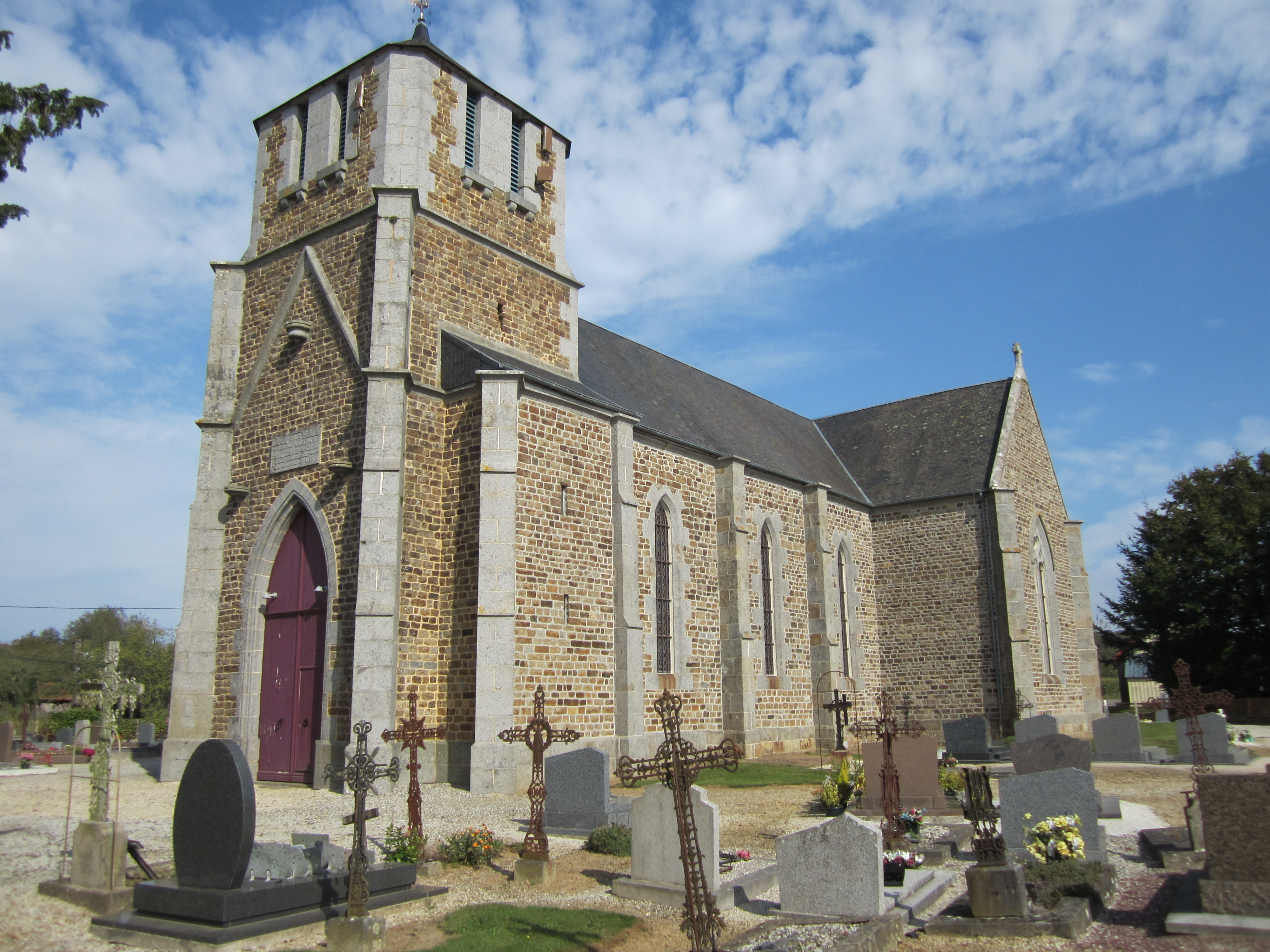 Le Mesnil-Ozenne, Manche